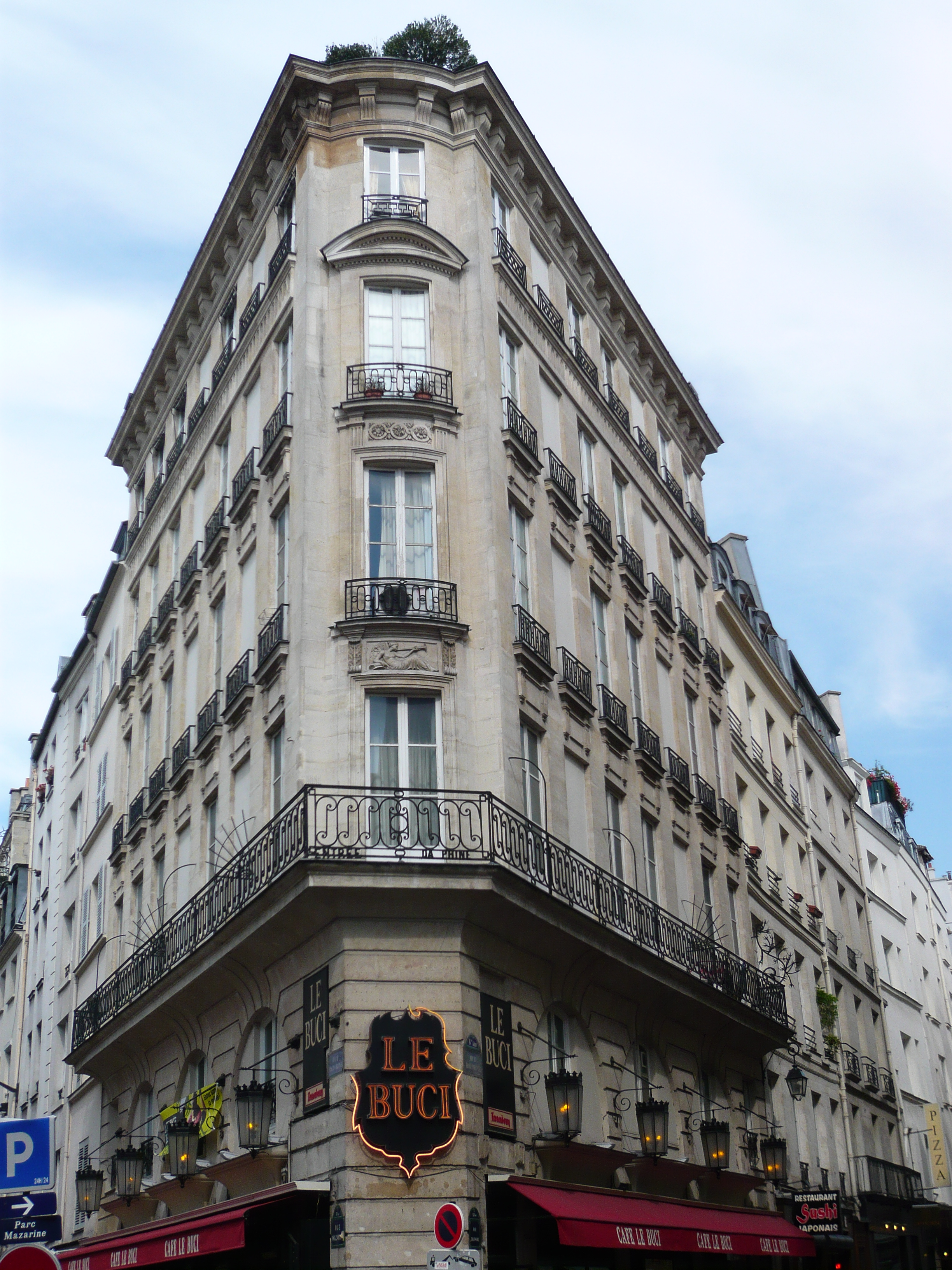 Maison 51 rue Mazarine 52 rue Dauphine .